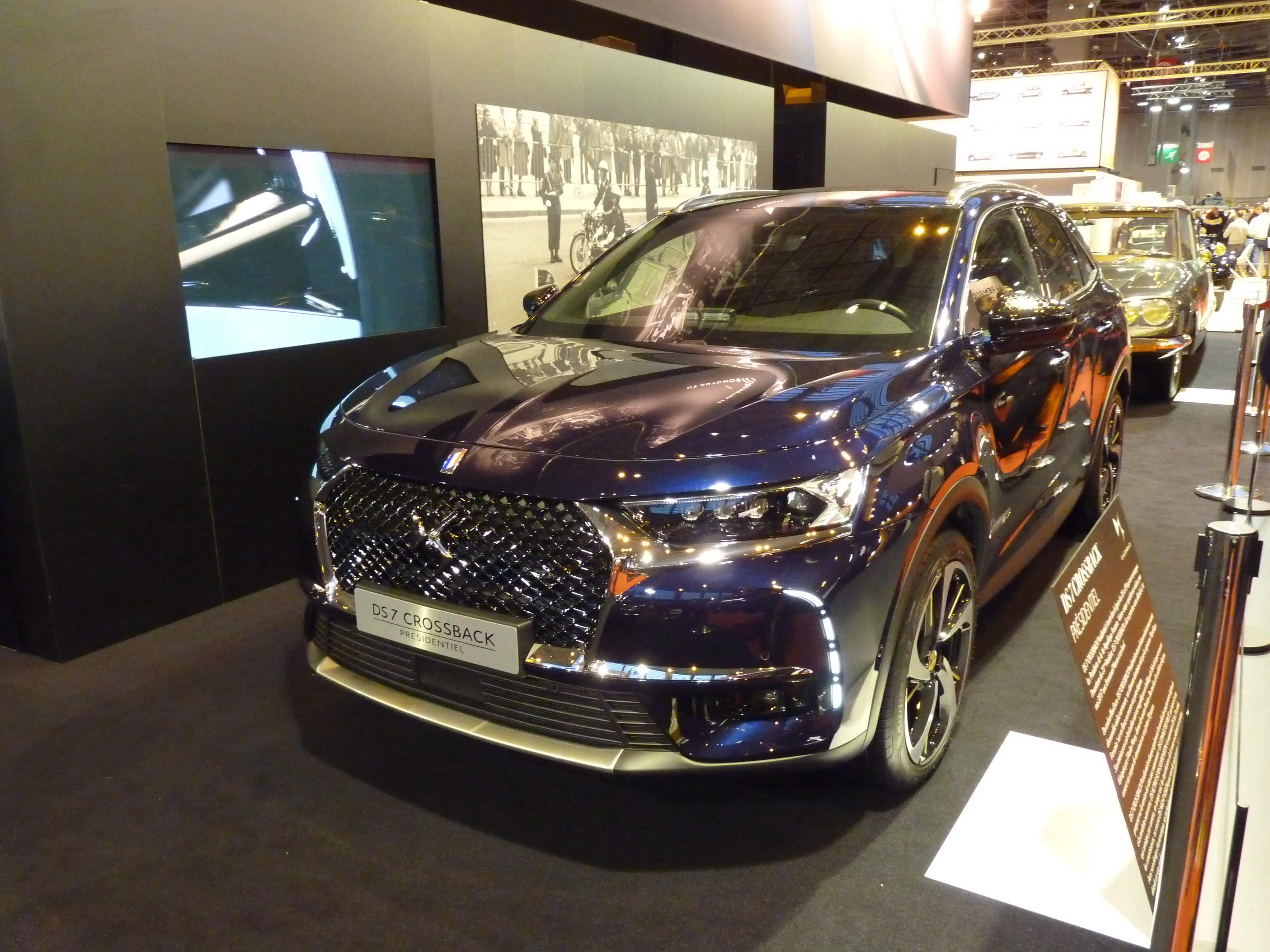 DS 7 Crossback Presidentiel au salon Rétromobile 2018